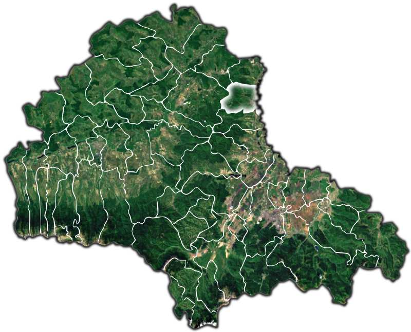 Apata jud Brasov